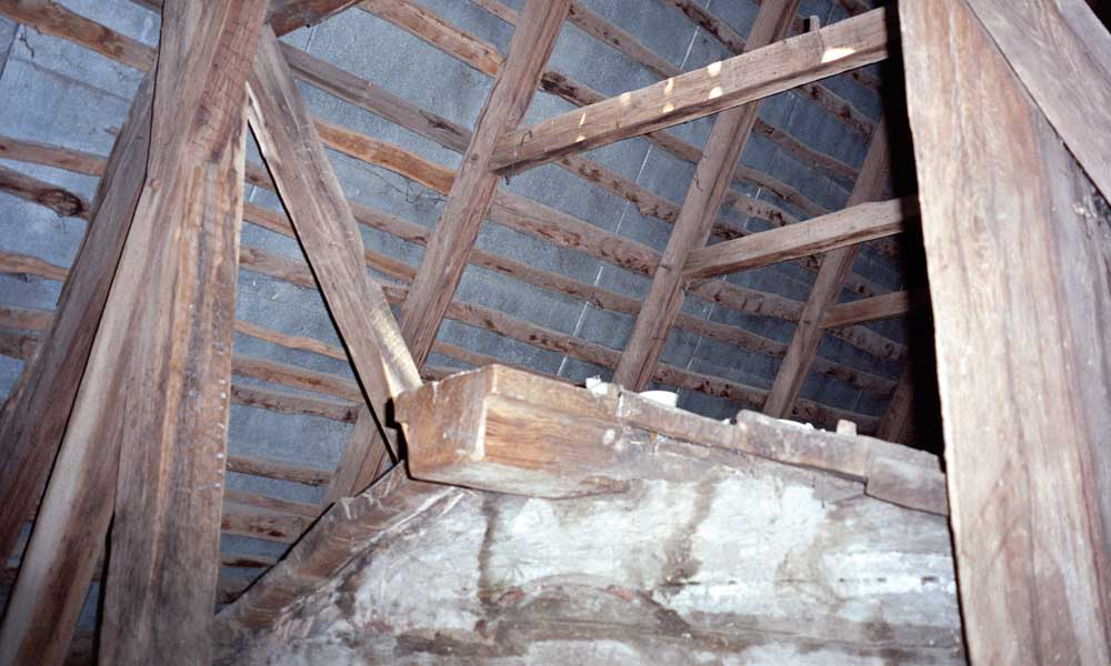 Bălan, Sălaj. Biserica de lemn din Josani, capătul meştergrindei în pod. Se observă sub el urme de pictură parietală.